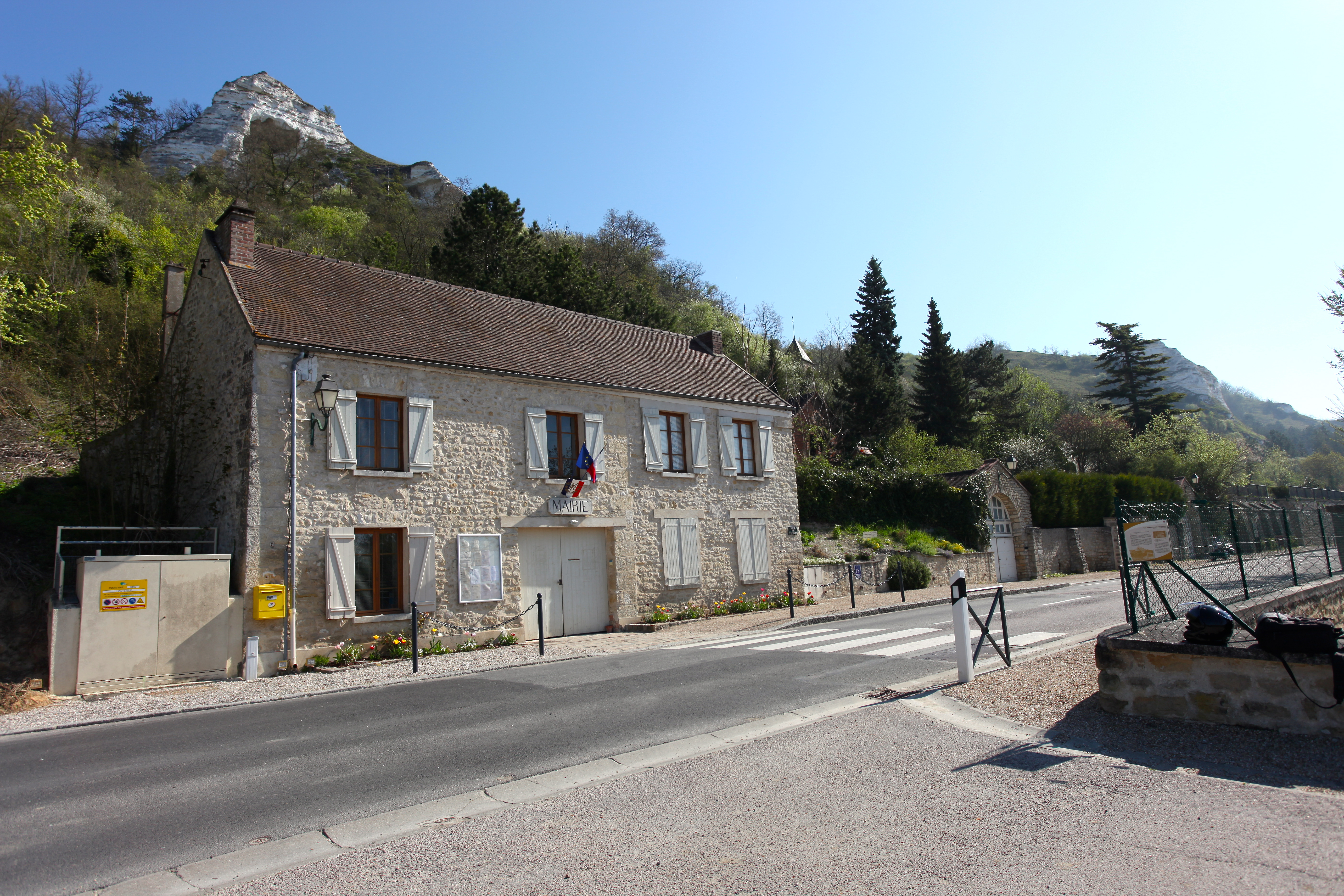 Mairie de Haute-Isle, Val-d'Oise, France.